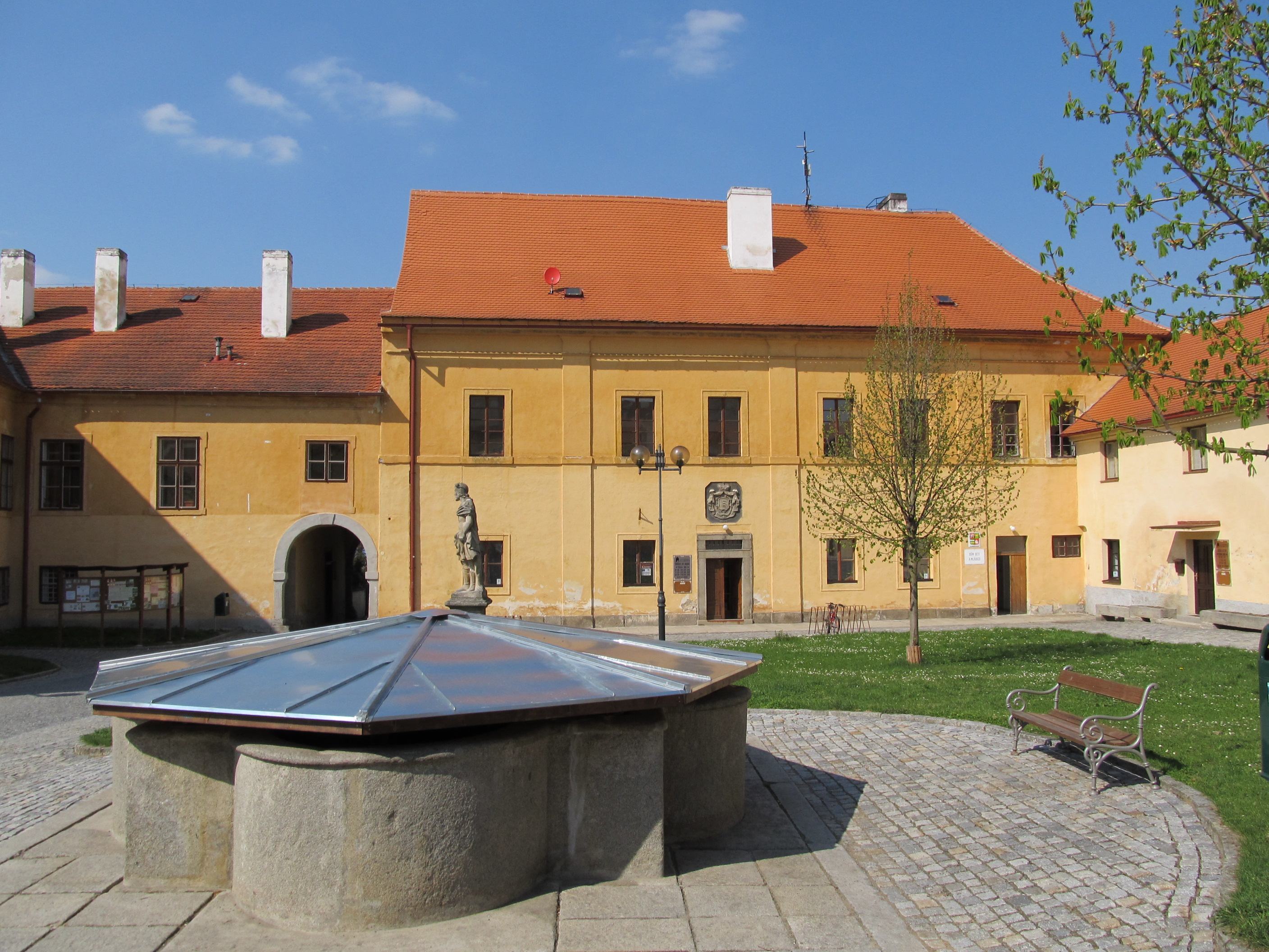 Horažďovice - zámek